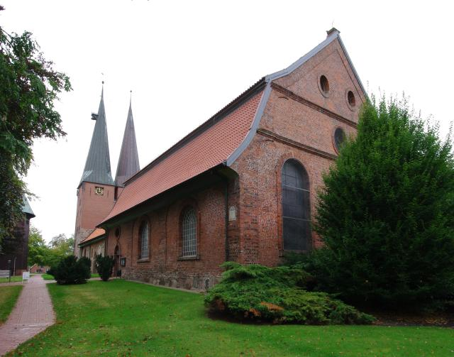 Der Bauerndom, Die Kirche St. Nicolai